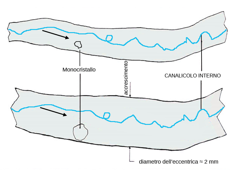 formazione delle eccentriche